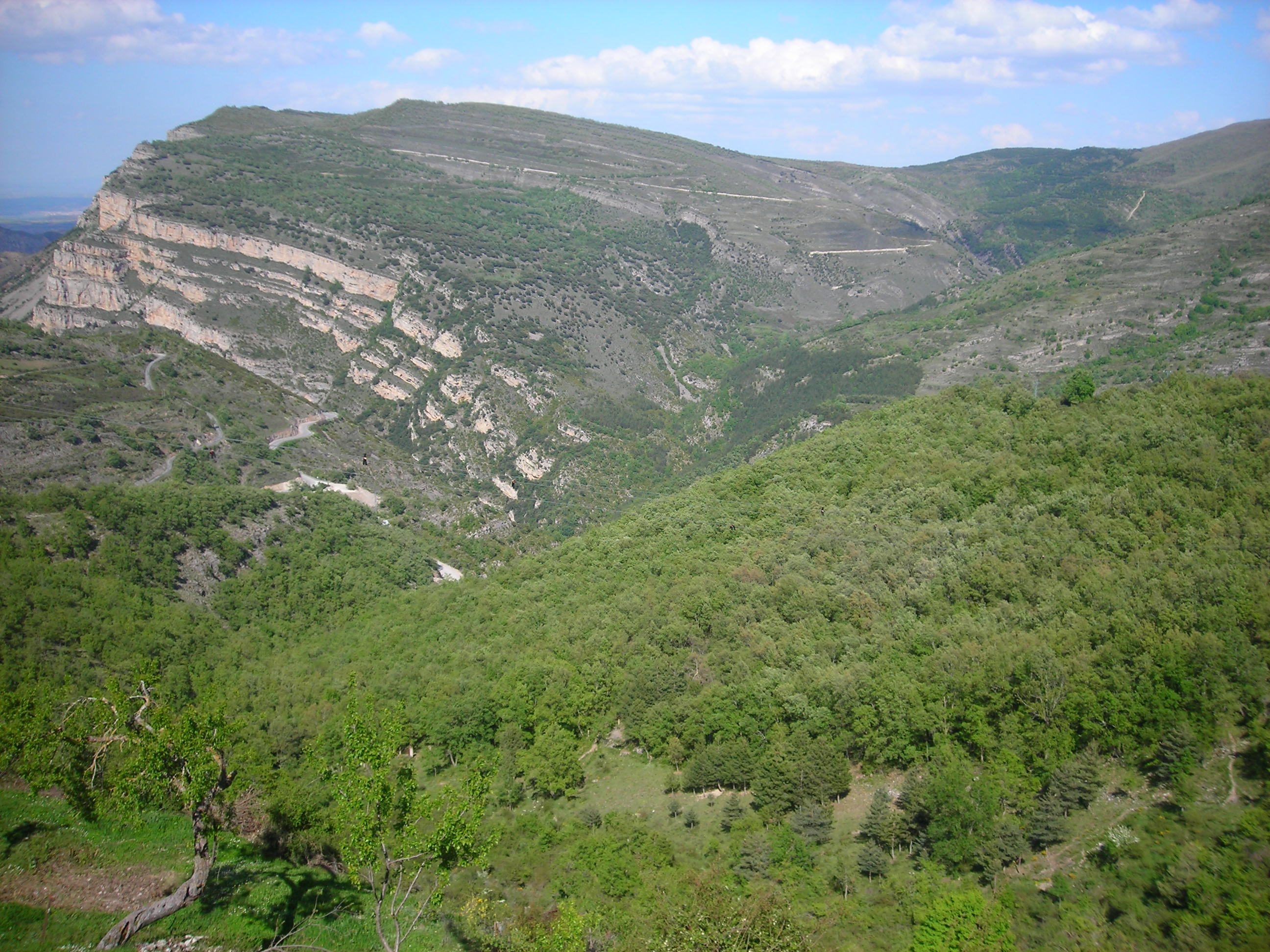 Cañón del Leza desde el mirador de La Carrasca